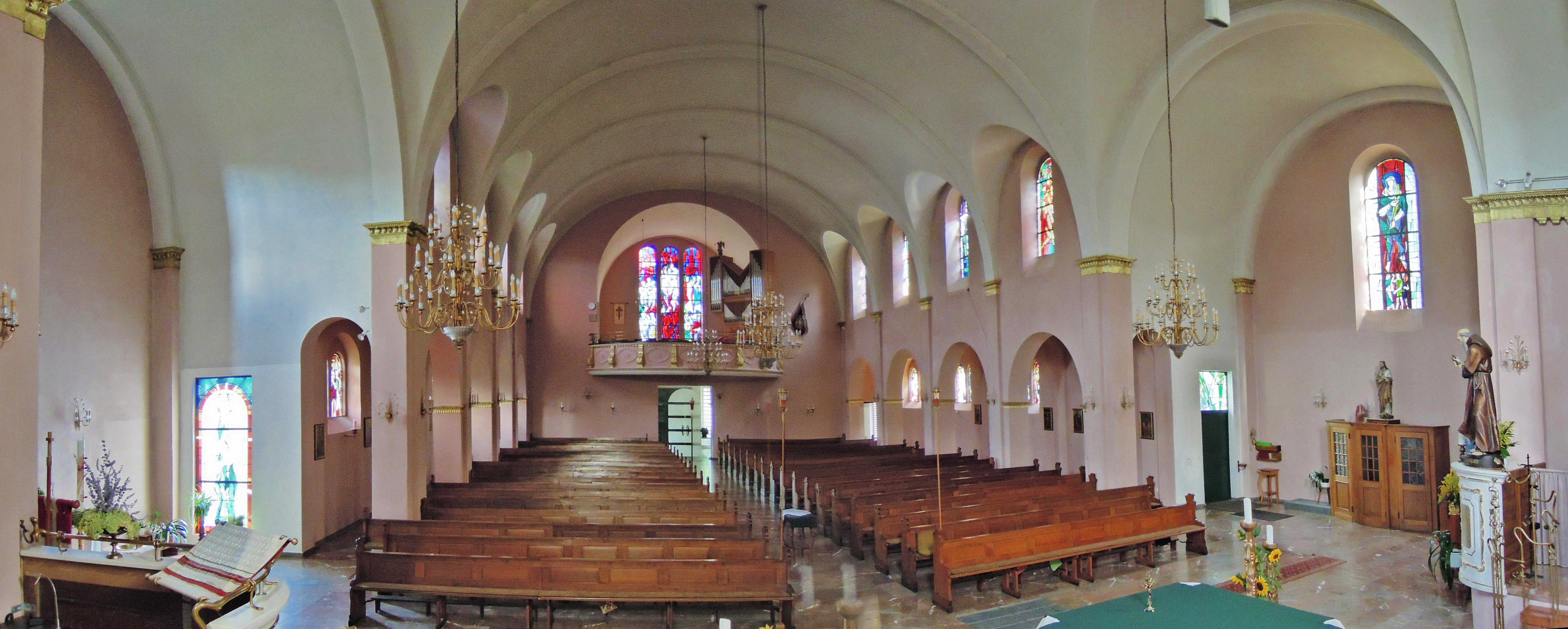 Pater-Nilles-Straße, kath. Pfarrkirche St. Konrad, 1934–36 von Josef Monz (Einzeldenkmal)